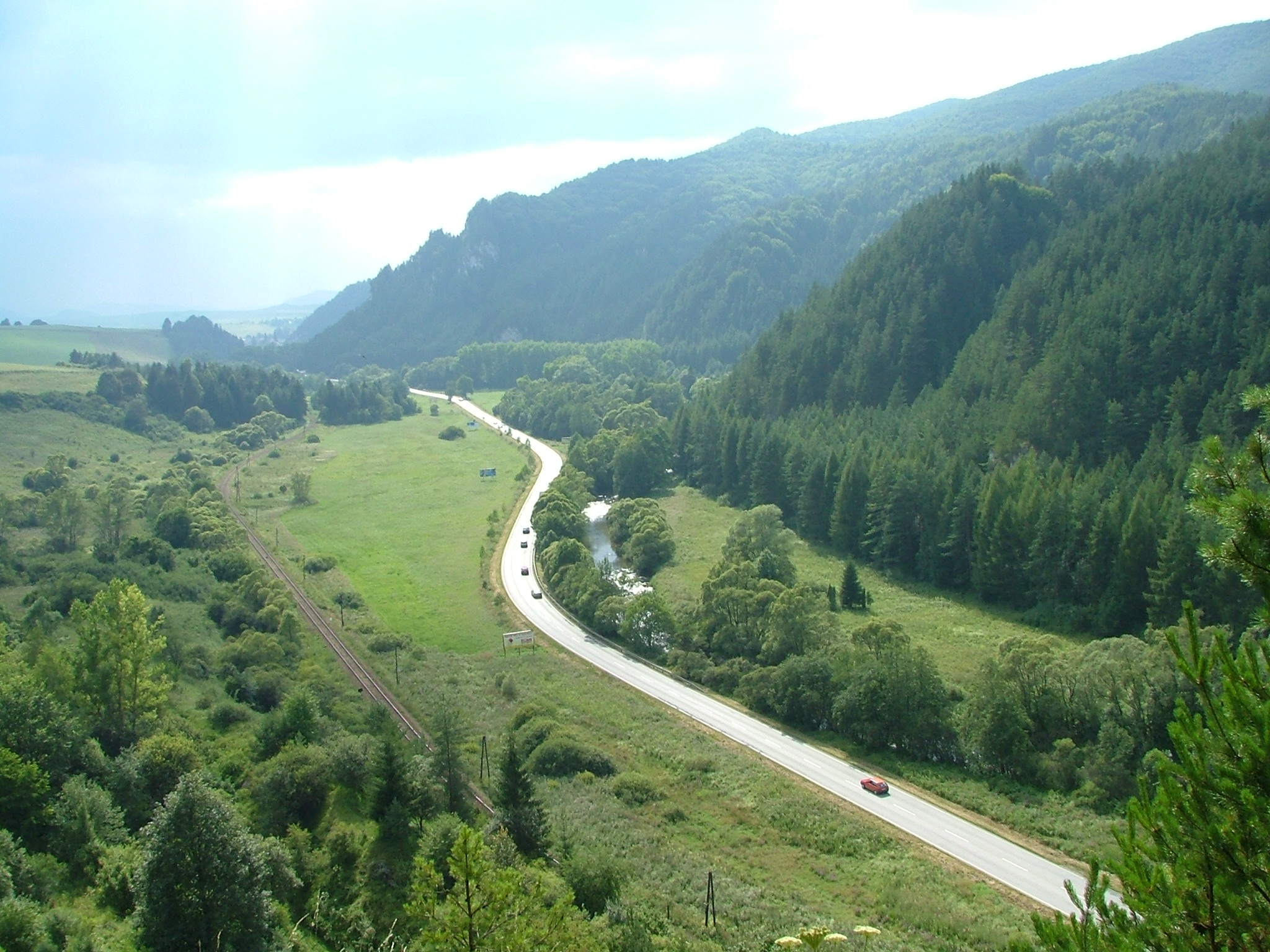 013 12 Turie, Slovakia